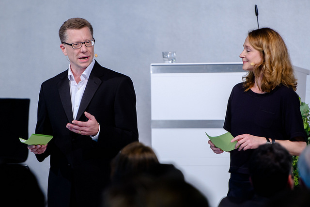 Bastian Hermisson (Büroleiter der HBS in Washington), Annette Maennel (Leiterin der Abteilung Kommunikation, HBS Berlin).